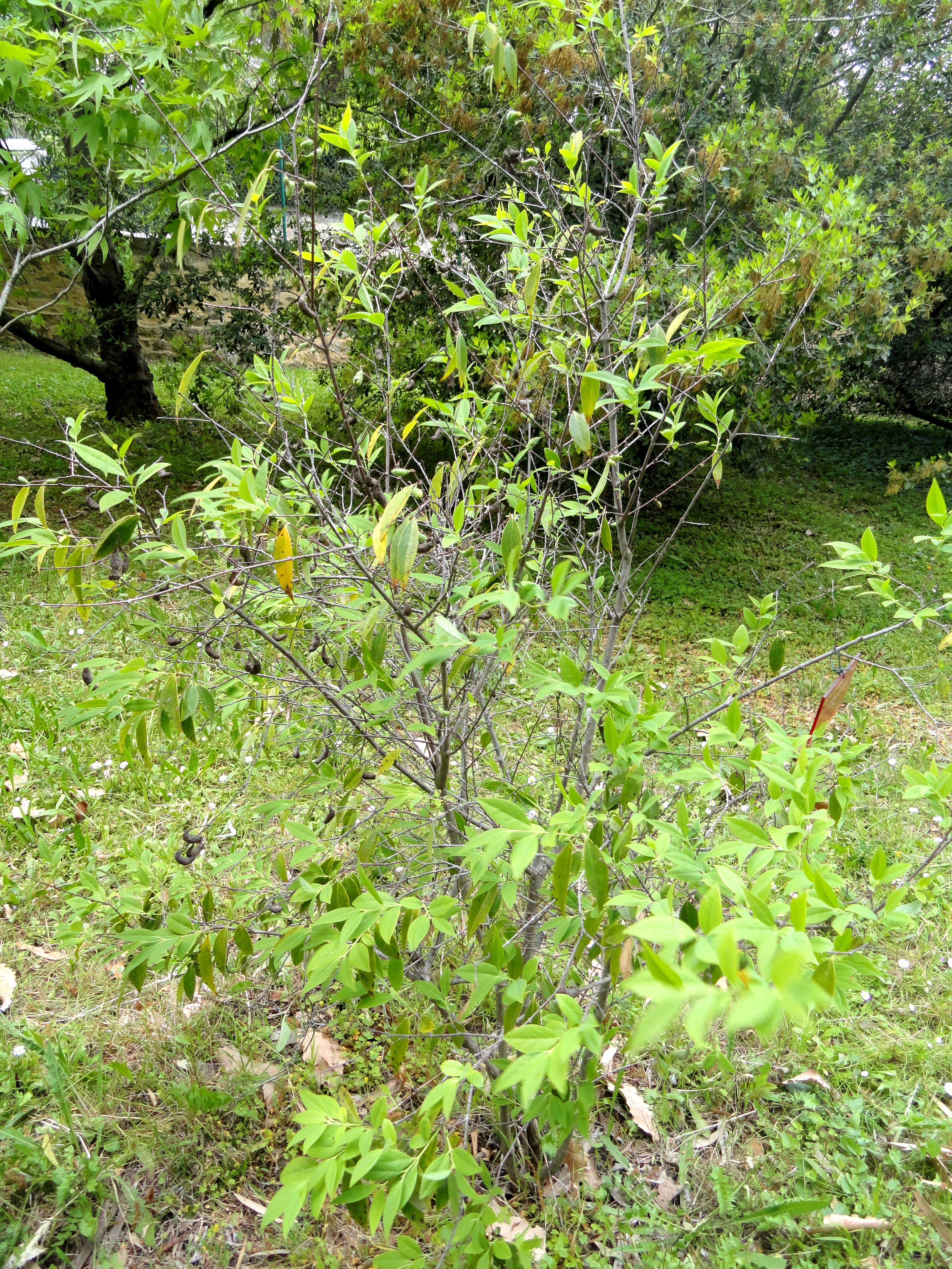 Chimonanthus salicifolius specimen in the Jardin botanique de la Villa Thuret, Antibes Juan-les-Pins, Alpes-Maritimes,France.